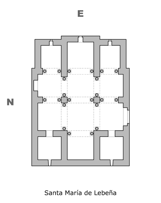 Planta de Santa María de Lebeña